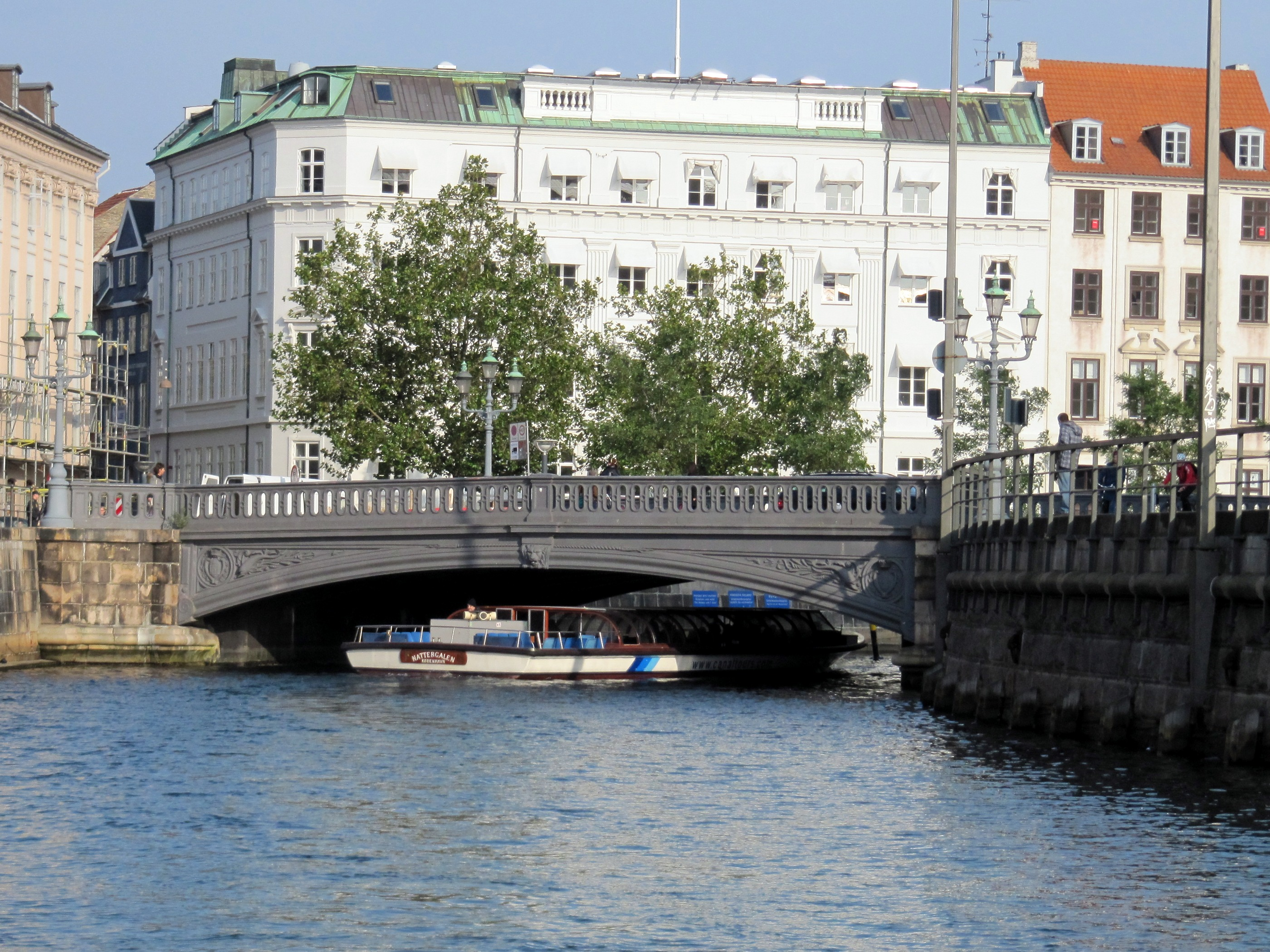 Højbru bridge in central Copenhagen, Denmark